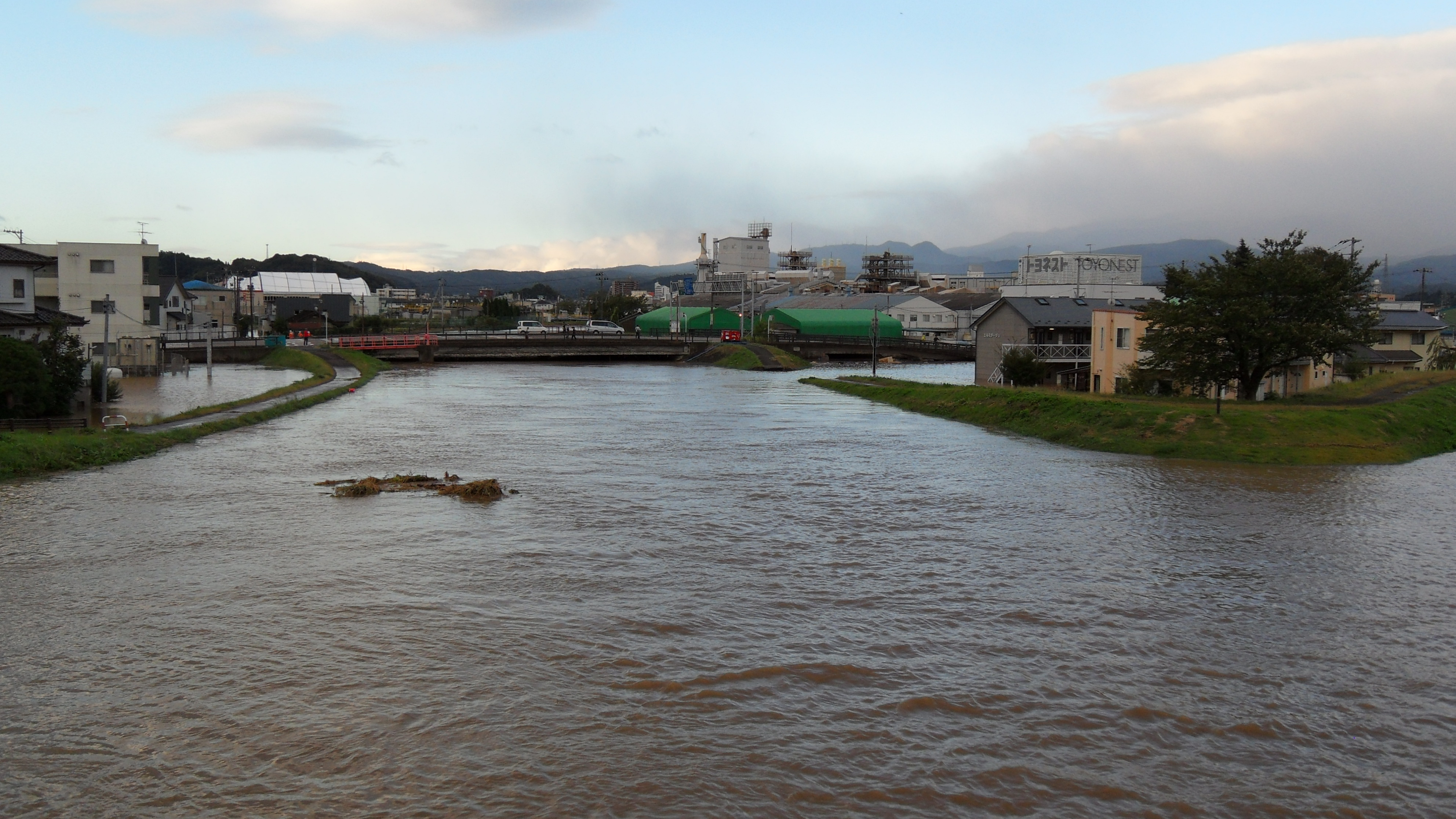 鳥谷野橋上から濁川の上流側を撮影. 濁川橋, 越水箇所（画面左は鳥谷野地区、画面右は郷野目地区）, 右から大森川が接続